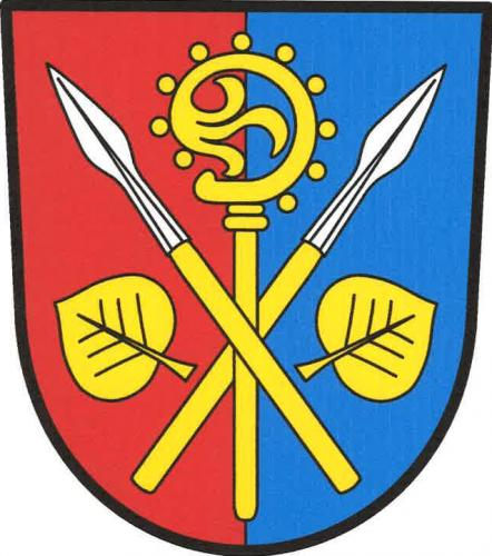 Strážiště, okres Mladá Boleslav, znak